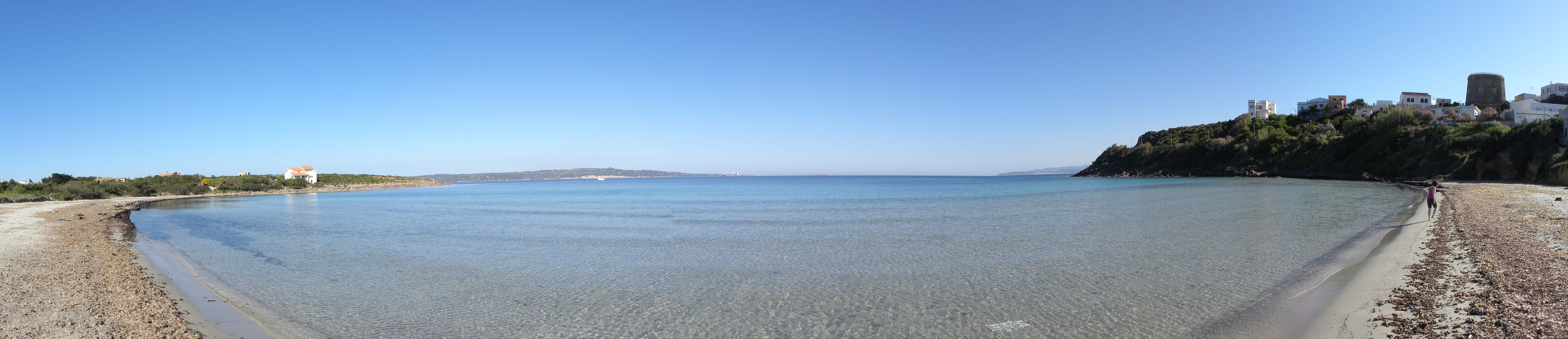 Panorama de una playa en la localidad italiana de Calasetta, en la isla de Sant' Antioco, Cerdeña.